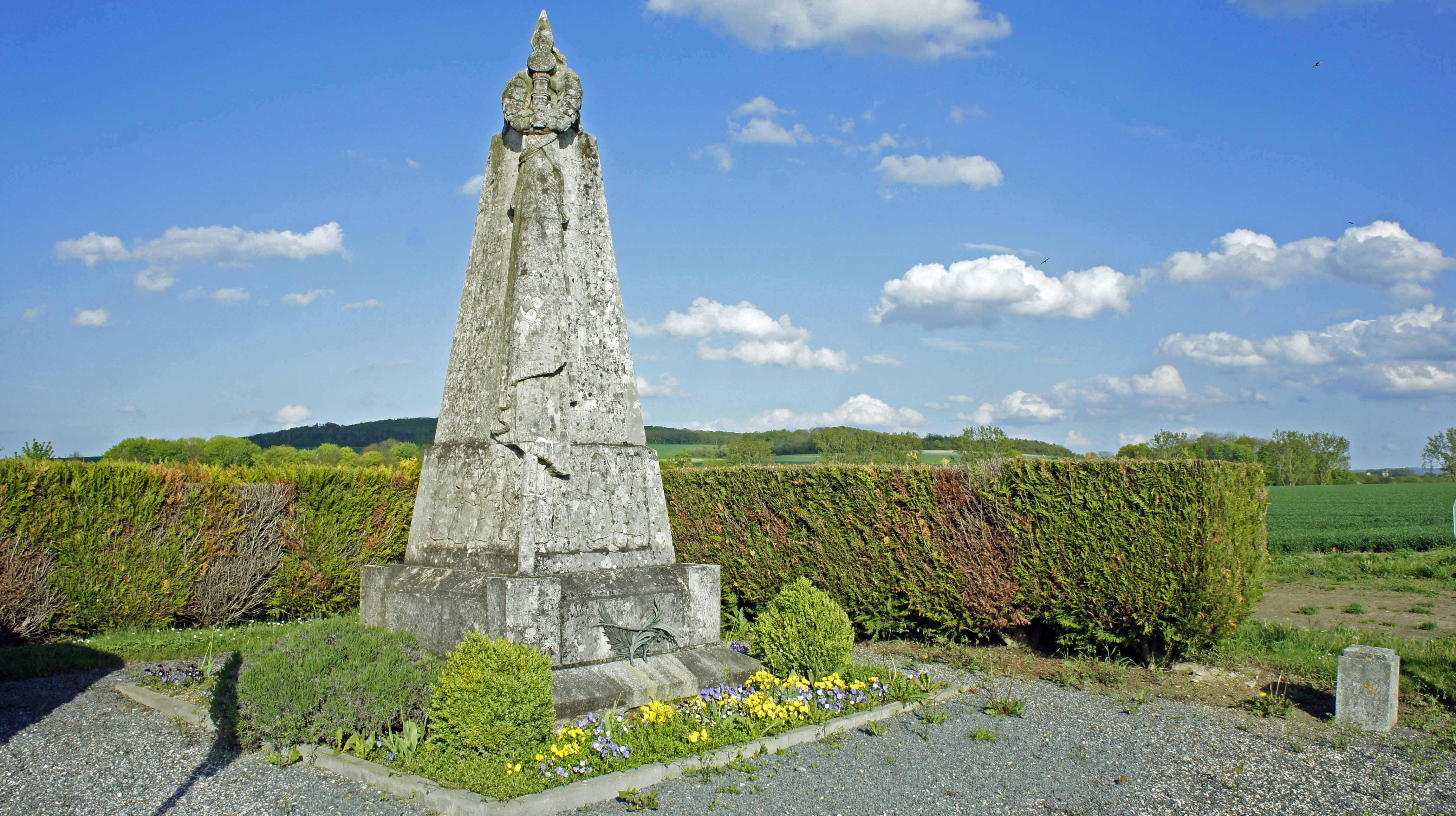 Une vue du monument en hommage au 363ri à Loivre.